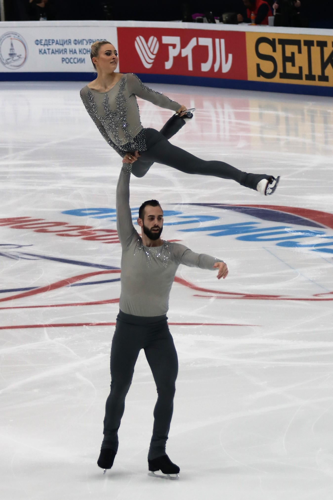 Эшли Кейн / Тимоти Ледук (США) на Rostelecom Cup 2018